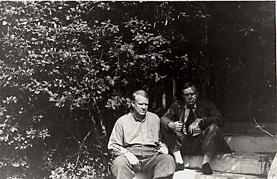 RA/PA-1193/V/0001 1105